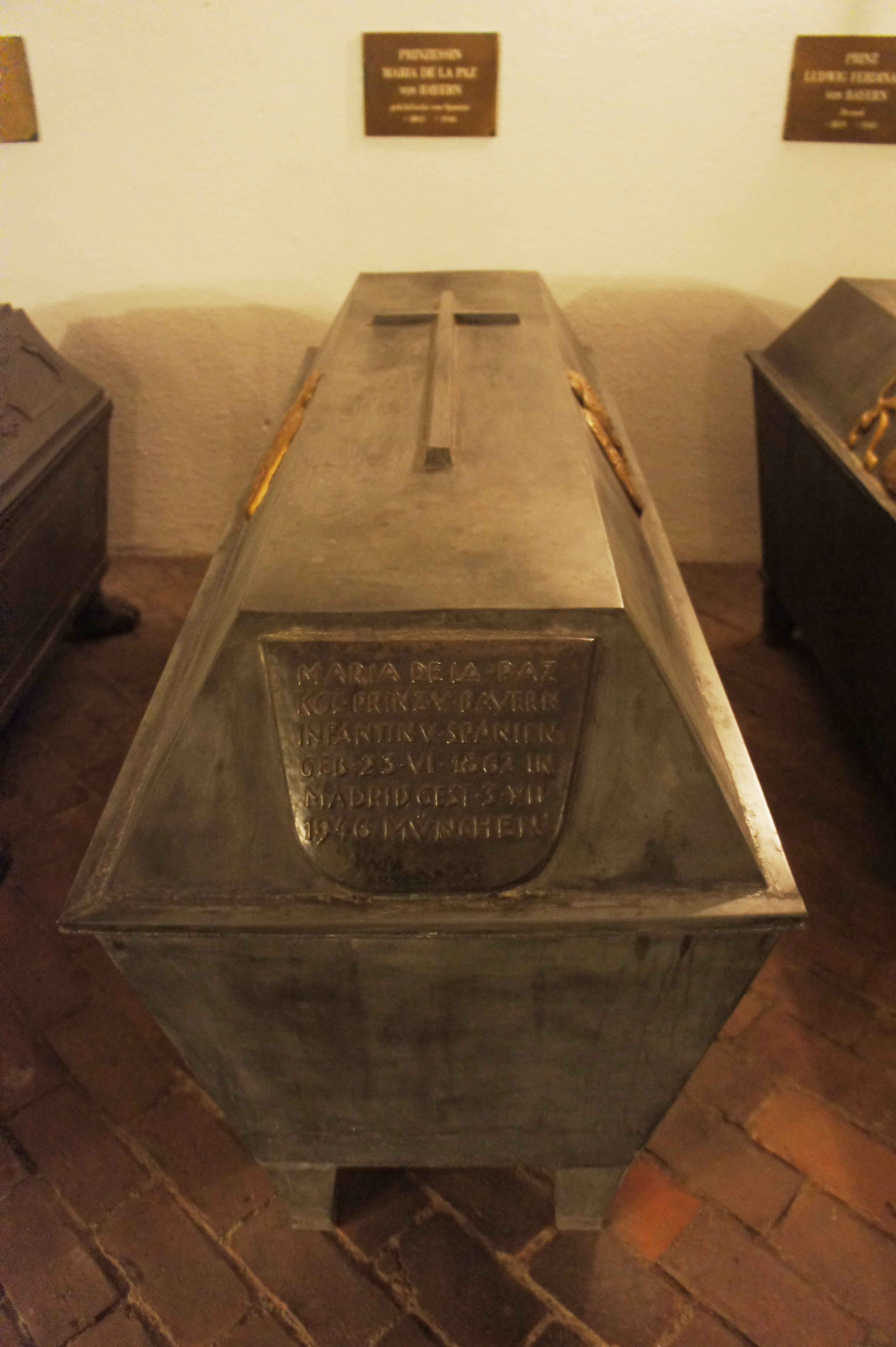 Infanta Maria de la Paz von Spanien (23. Juni 1862 – 4. Dezember 1946) (Gemahlin von Prinz Ludwig Ferdinand). Sarkophag in der Grablege der Wittelsbacher in der St. Michael Kirche in München.